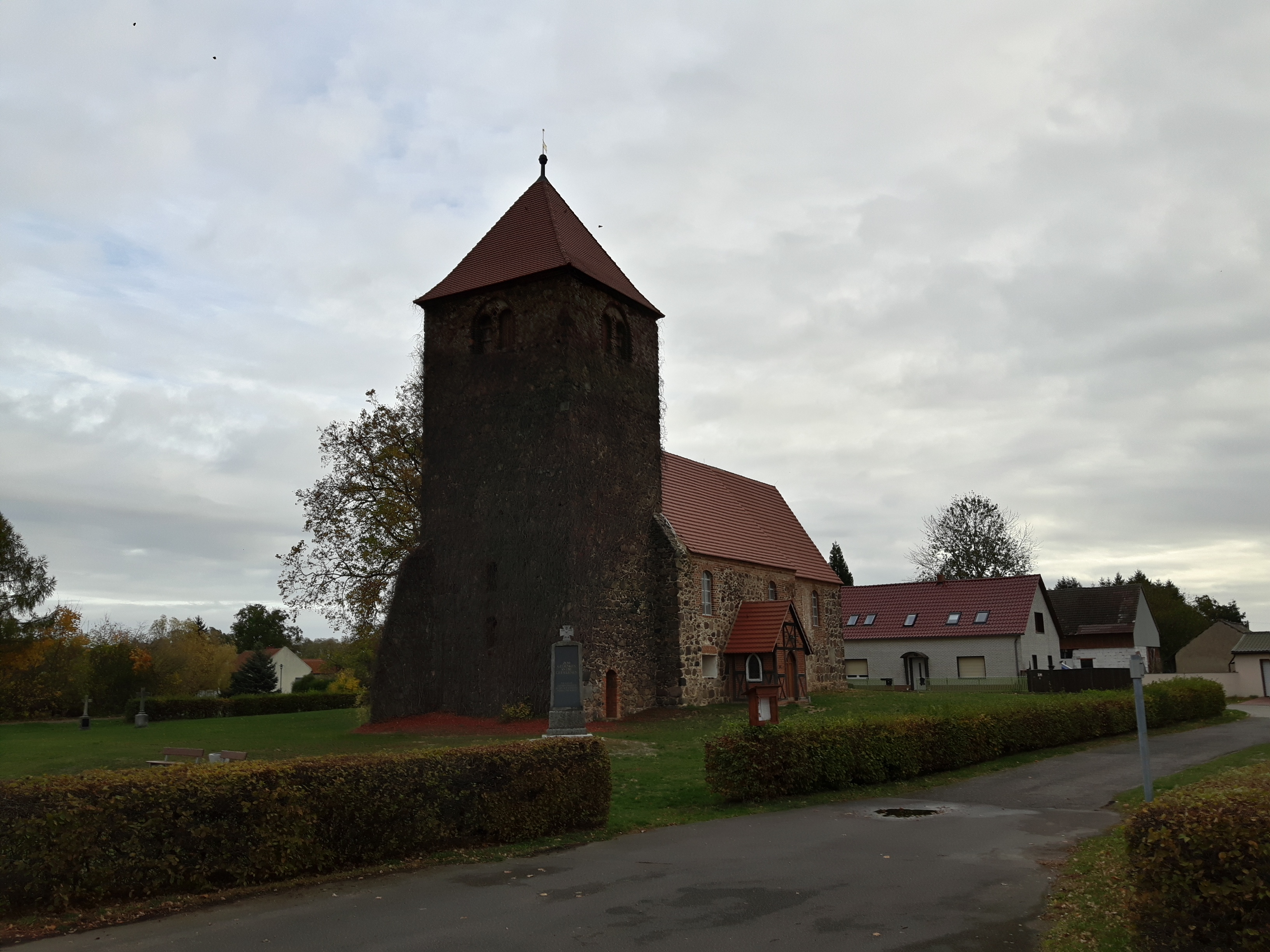 Die unter Denkmalschutz stehende Dorfkirche in Terpt, Ortsteil der Stadt Luckau im Landkreis Dahme-Spreewald. Sie wurde im frühen 14. Jahrhundert errichtet.